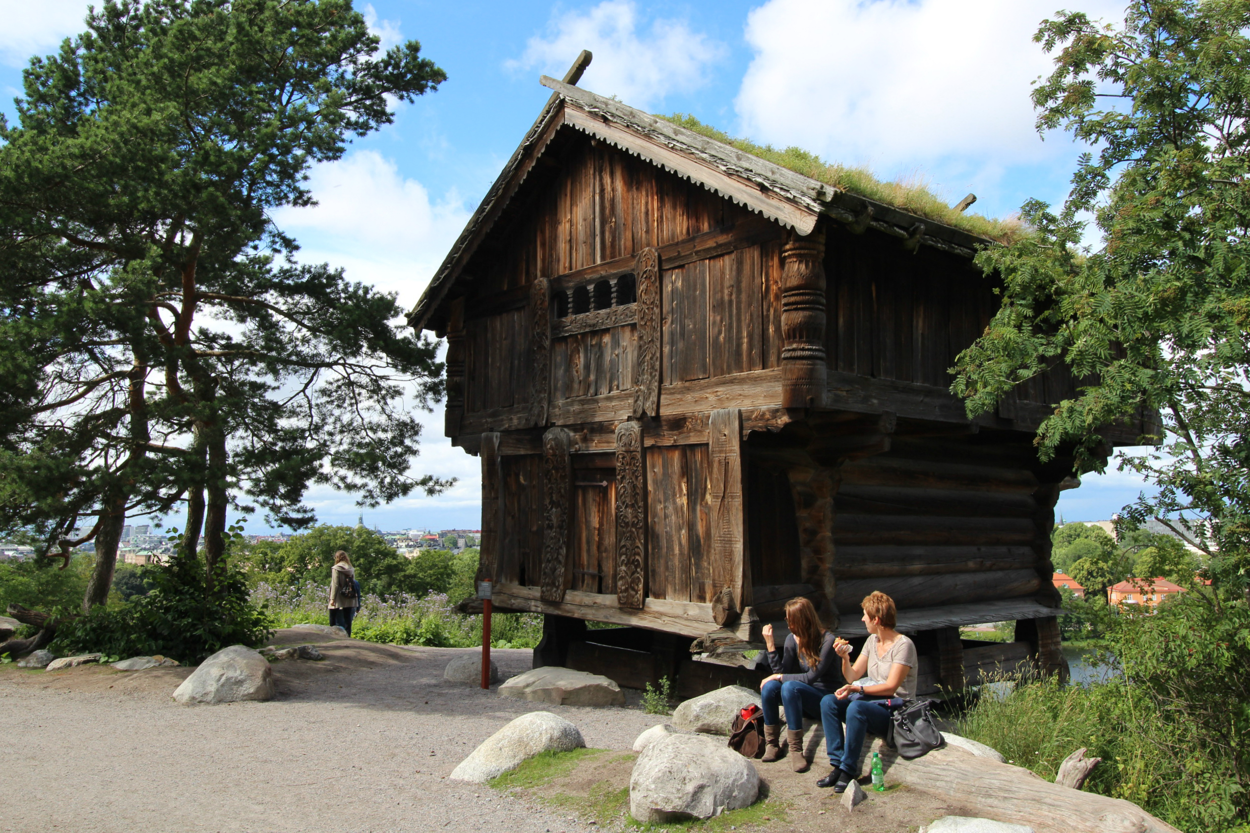 Vastveitloftet på Skansen, Stockholm. Ursprungligen från Flatdal i Telemark fylke i Norge.